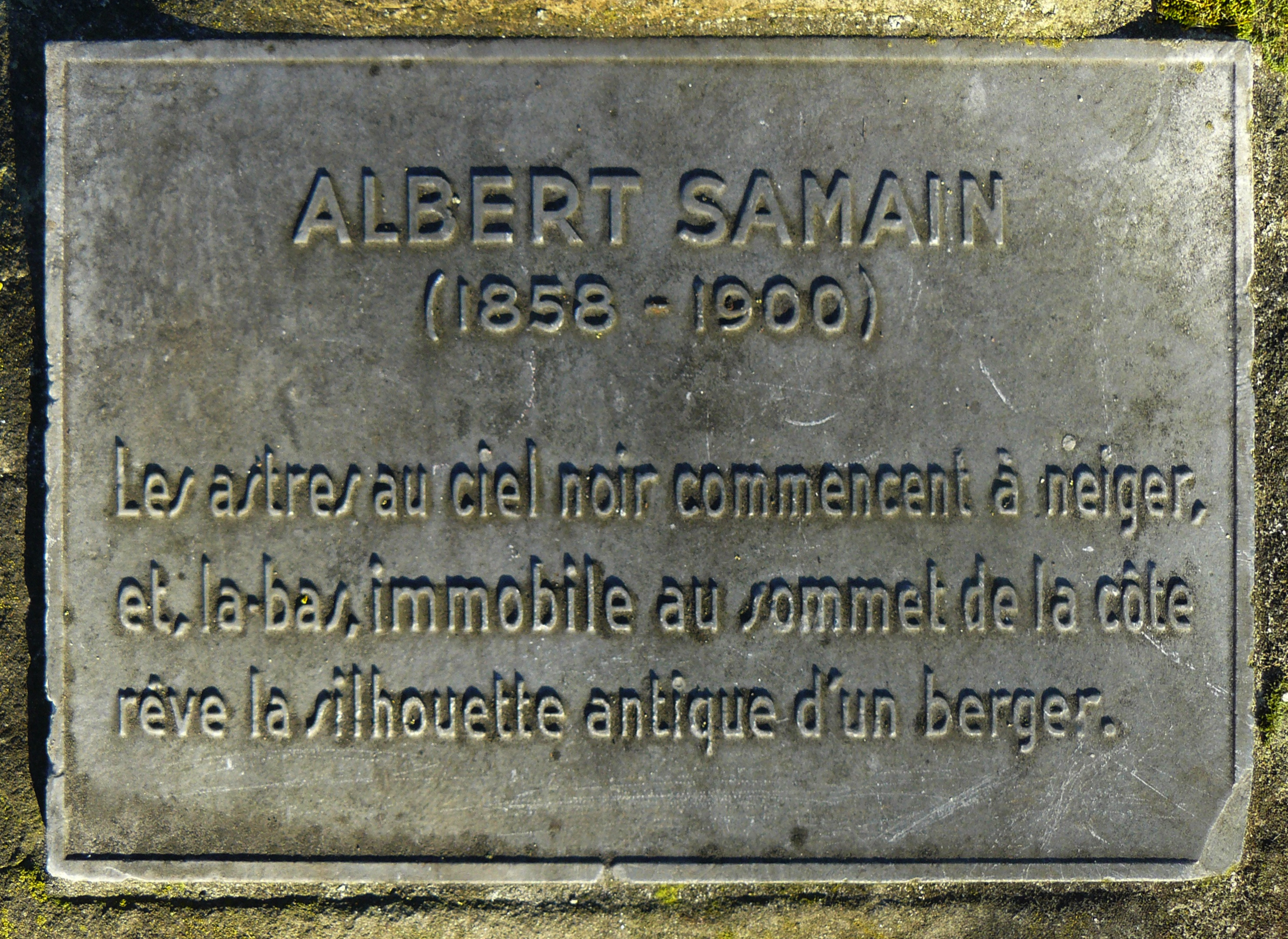 Vers d'Albert Samain, Jardin des Poètes, Paris 16ème